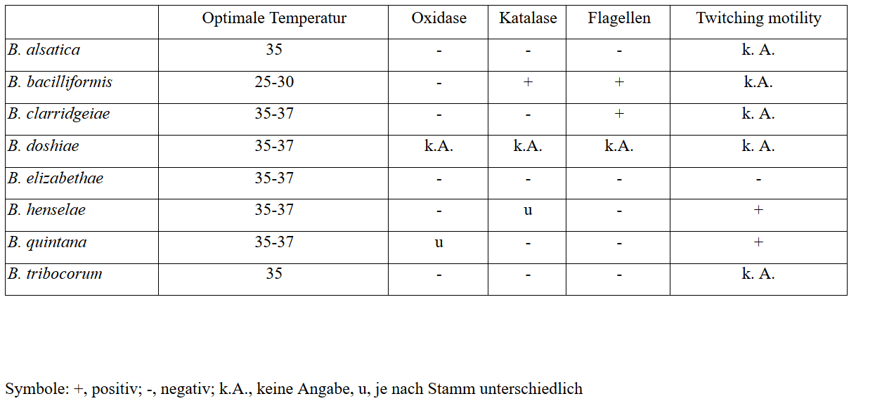 Eine selbst erzeugte Tabelle mit einer Auswahl von einigen Merkmalen einiger Arten von Bartonella. Quelle: Die Daten stammen aus: George M. Garrity (Hrsg.): Bergey’s Manual of Systematic Bacteriology. 2. Auflage, Band 2: The Proteobacteria. Part C: The Alpha-, Beta-, Delta-, and Epsilonproteabacteria. Springer, New York 2005, ISBN 978-0-387-24145-6.